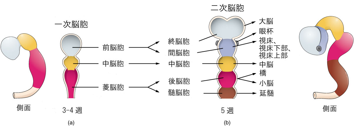 ヒトの胚における一次脳胞と二次脳胞